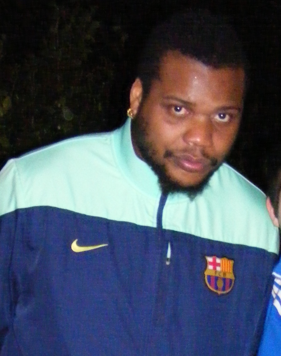 Cédric Sorhaindo es un balonmanista francés